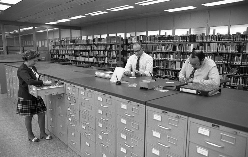 VW-Werk, Wolfsburg Krankenabteilung